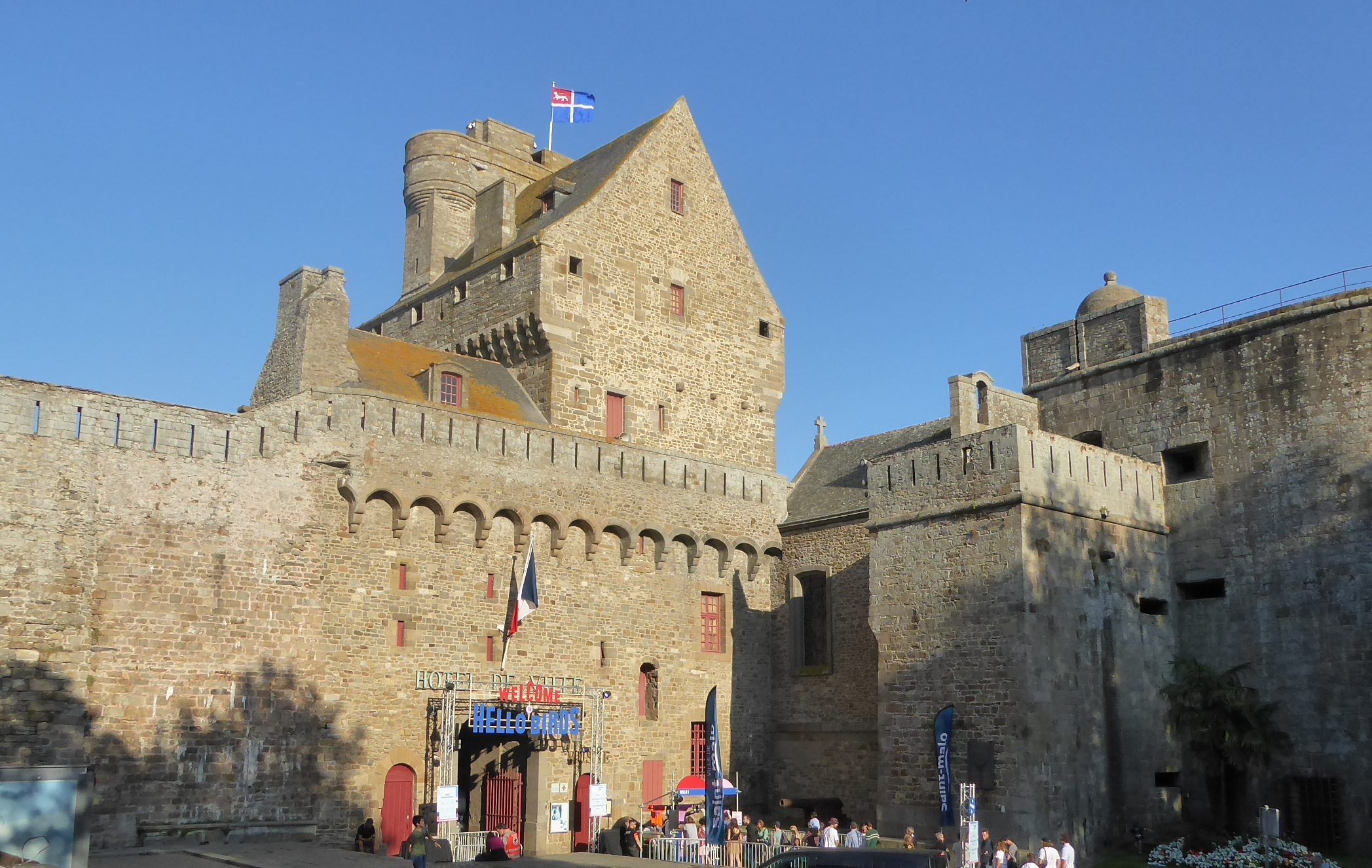 Photo du Château de Saint-Malo vue de l'esplanade Félicité Robert de Lamennais